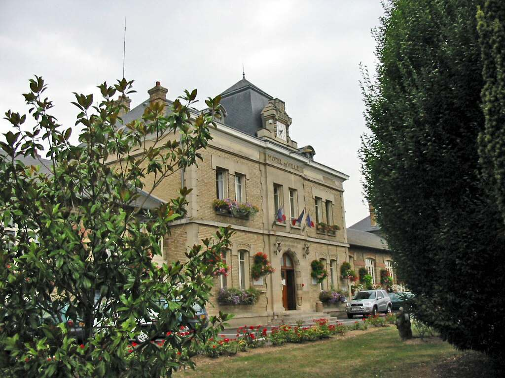 Mairie de Gargenville (Yvelines) Photo JH Mora, août 2005